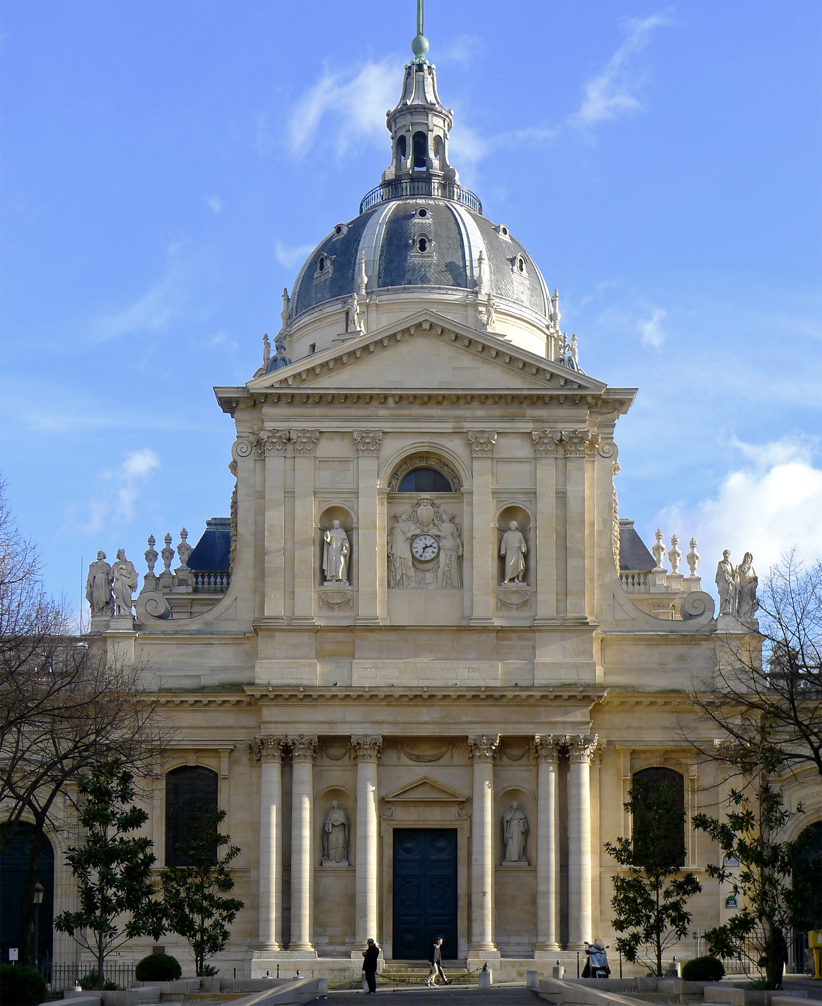 Chapelle Sainte-Ursule de la Sorbonne - Paris V